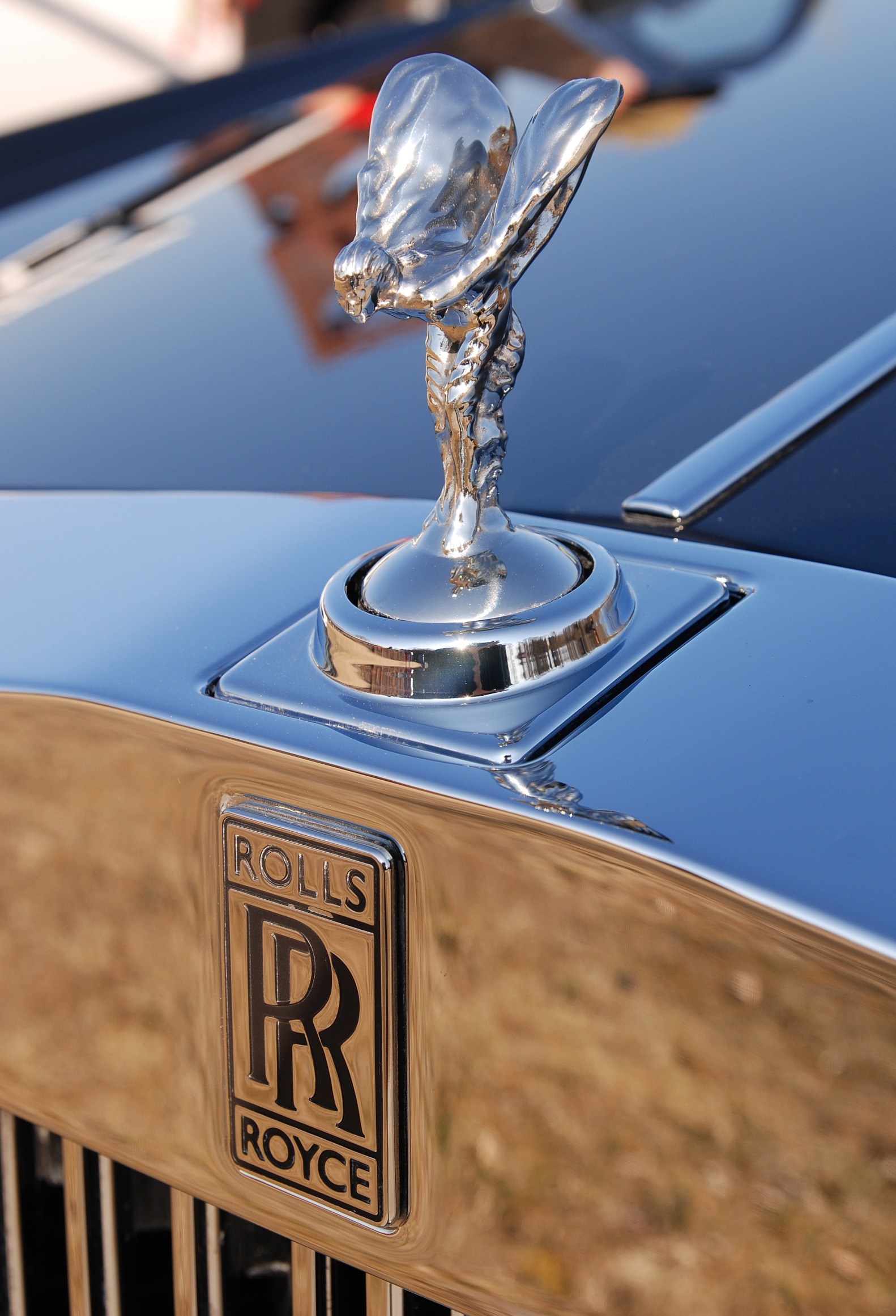 Rolls-Royce Kühlerfigur „The Spirit of Ecstasy“, hier an einem Rolls-Royce Phantom (2003)